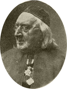 Petrus Claudius Theodorus Malingré (1826-1910), deken en bouwpastoor van Gouda